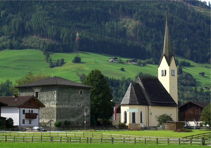 Kath. Filialkirche hl. Nikolaus und Felberkasten in Mittersill, Salzburg.